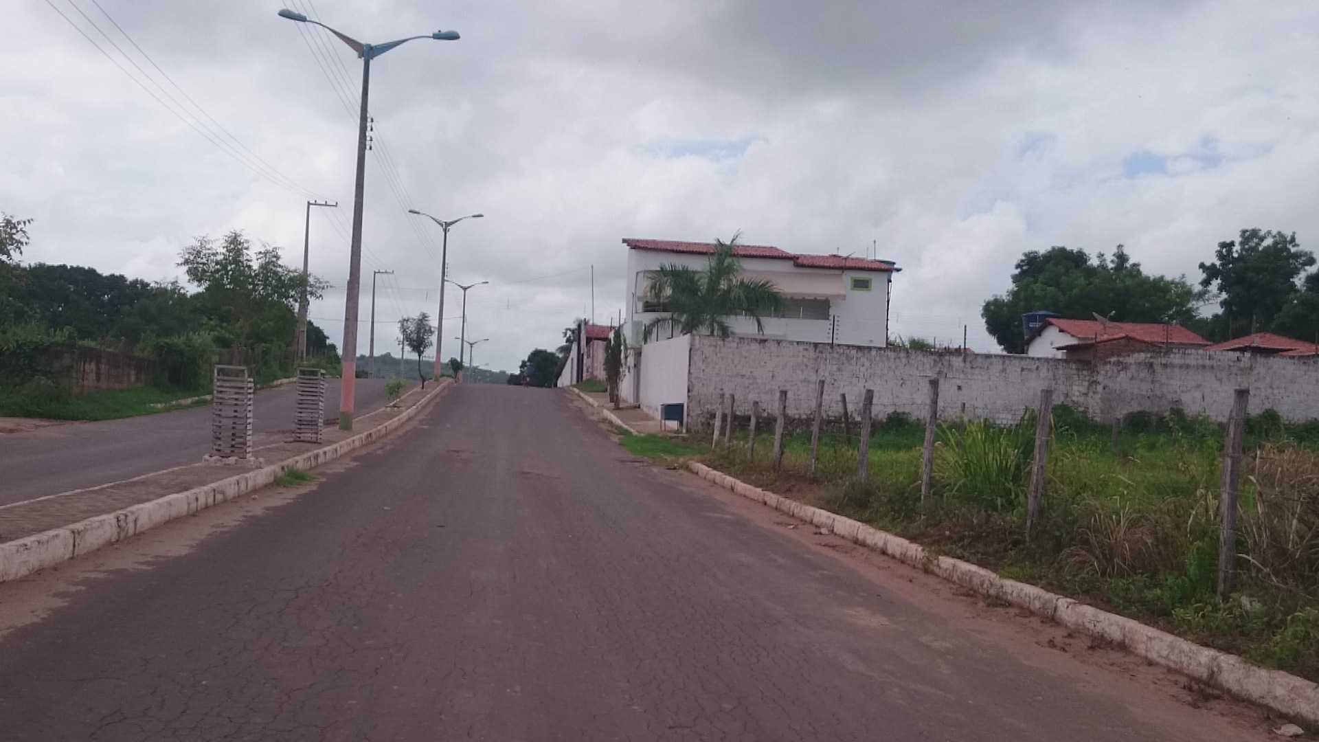 Av. Raimundo da Silva Barros, bairro Serra Dourada, Lago da Pedra - MA